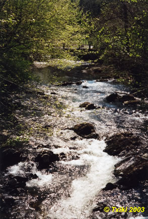 La Nivelle à Ascain Pyrénées).